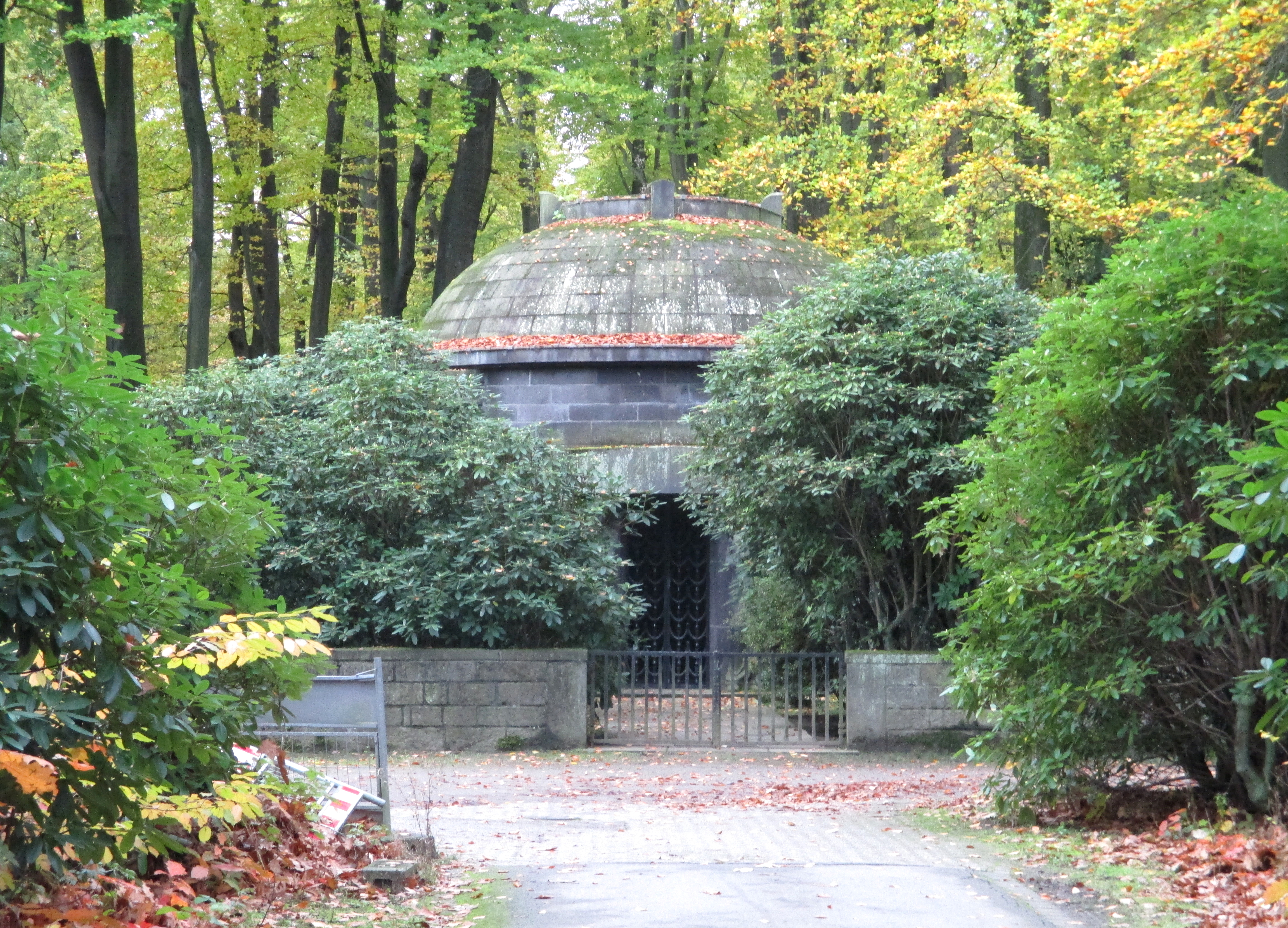 Denkmalgeschütztes Mausoleum des Großindustriellen Peter Klöckner.